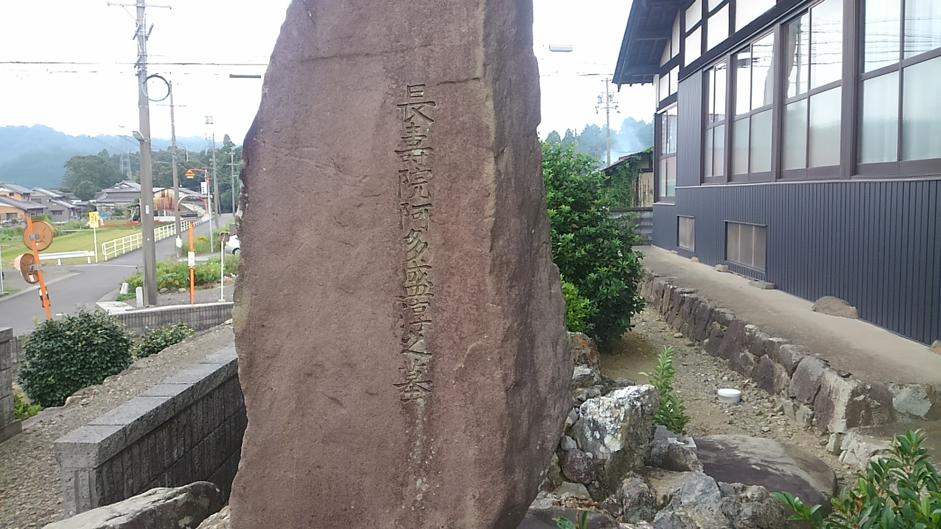 牧田にある墓